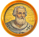 Médaillon de la frise des papes à Saint-Paul-hors-les-Murs. Il s'agit d'une mosaïque représentant Jean VII, 86e pape de l'Église catholique (705-707). Il fait parie de la série de médaillons voulue par Grégoire XVI destinée à remplacer ceux de l'ancienne basilique après l'incendie de 1823.